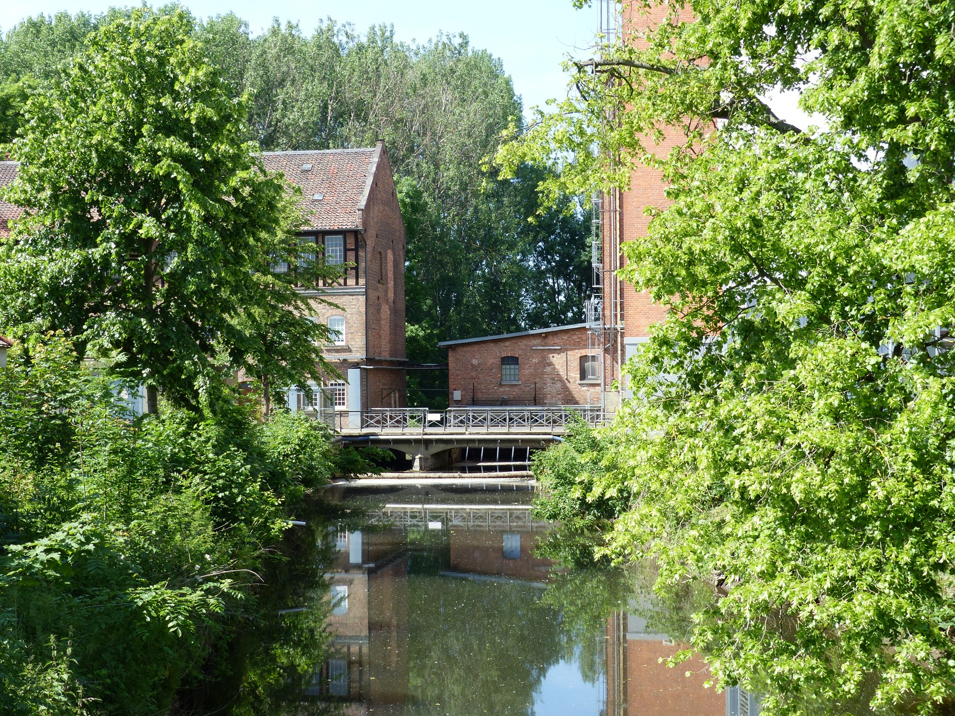 Wehr der Okermühle Hedwigsburg.